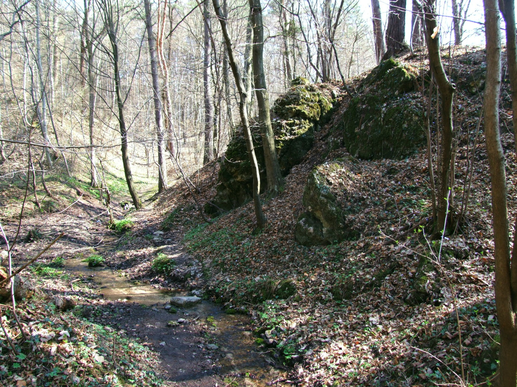 Potok Rudno w obrębie Rezerwatu Dolina potoku Rudno